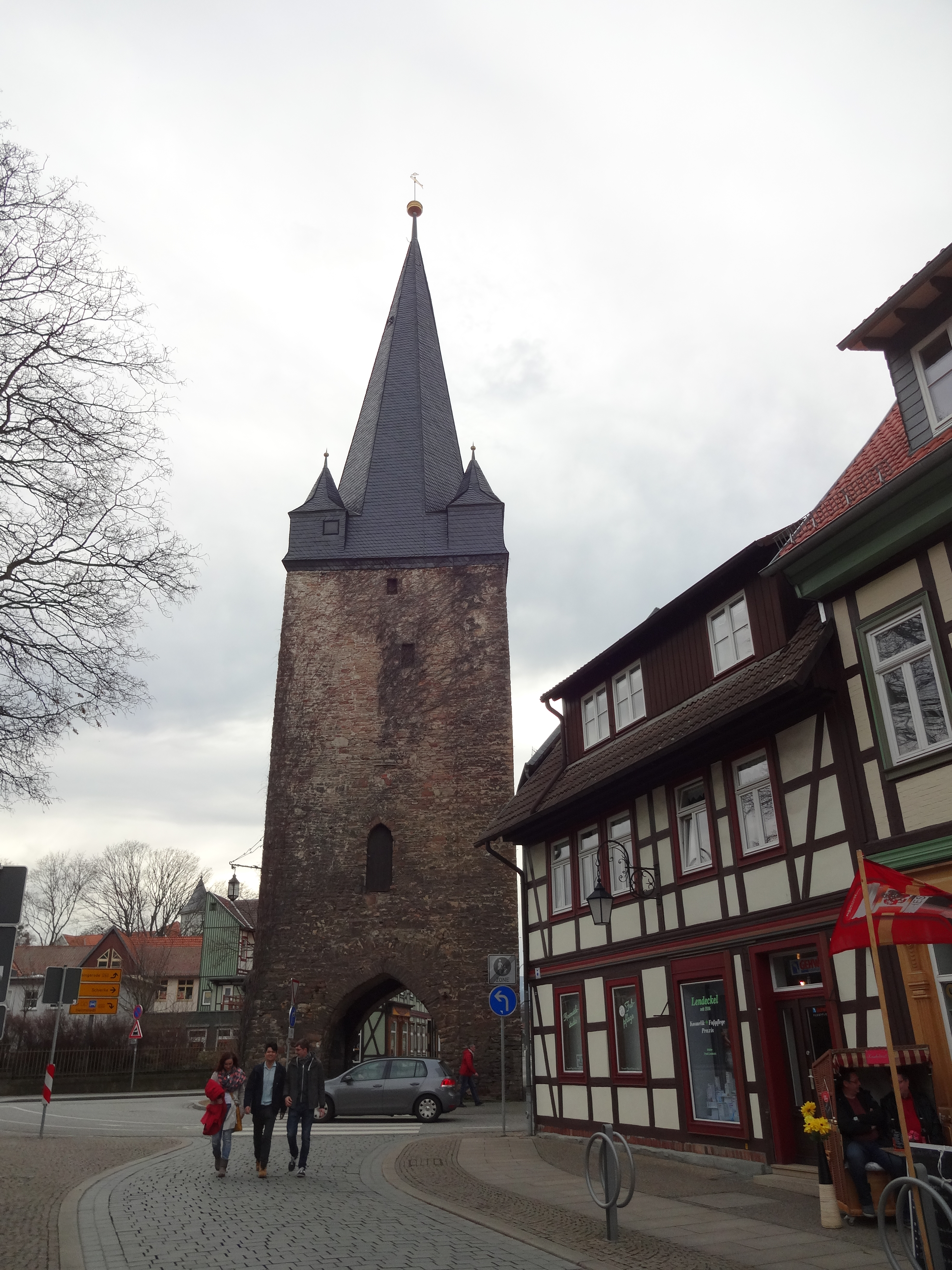 Das ehemalige Kulturdenkmal Westerntorturm in Wernigerode; gesehen von der Breiten Straße